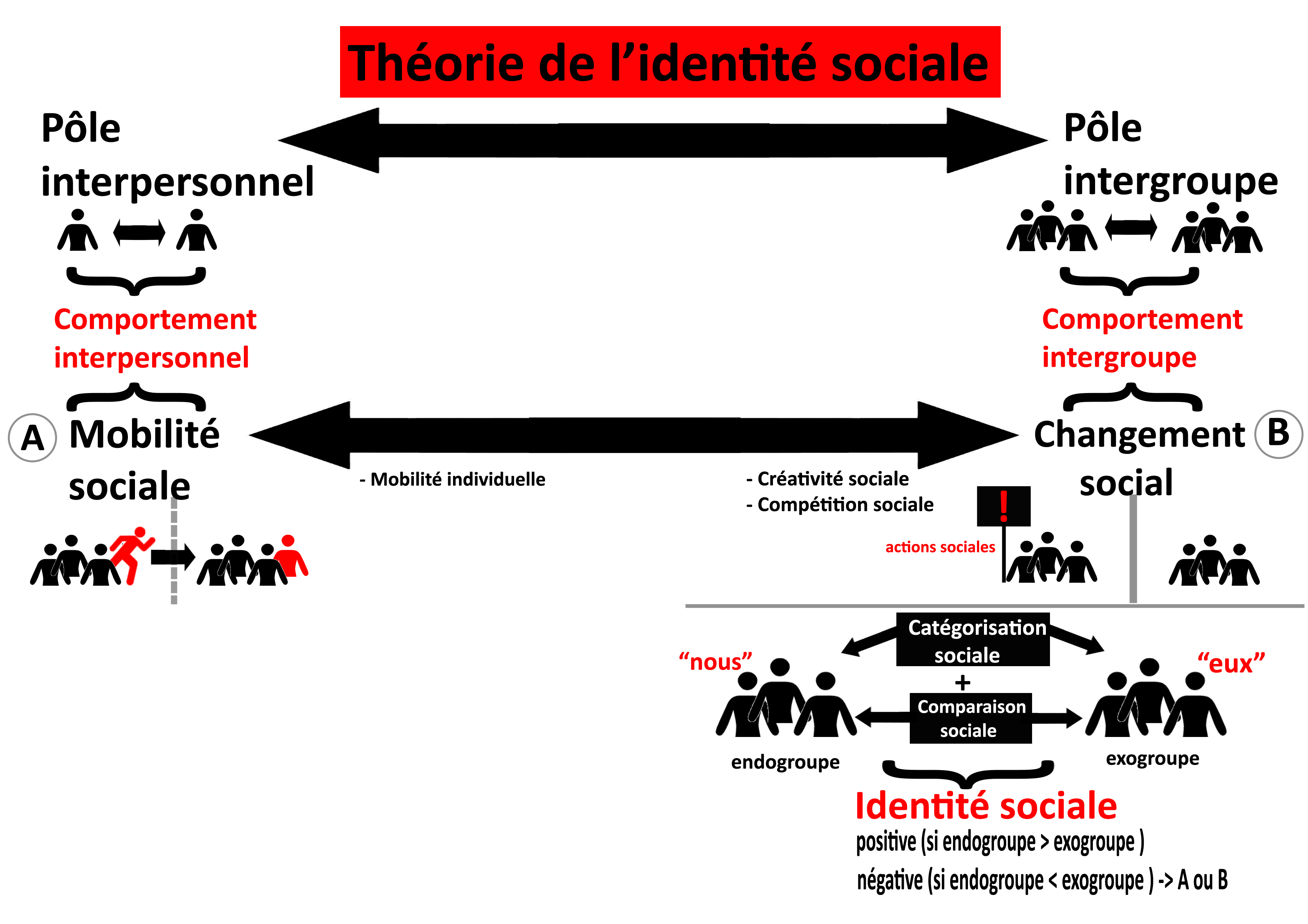 Ce schéma récapitulatif reprend les grandes idées de la Théorie de l'identité sociale de Henri Tajfel